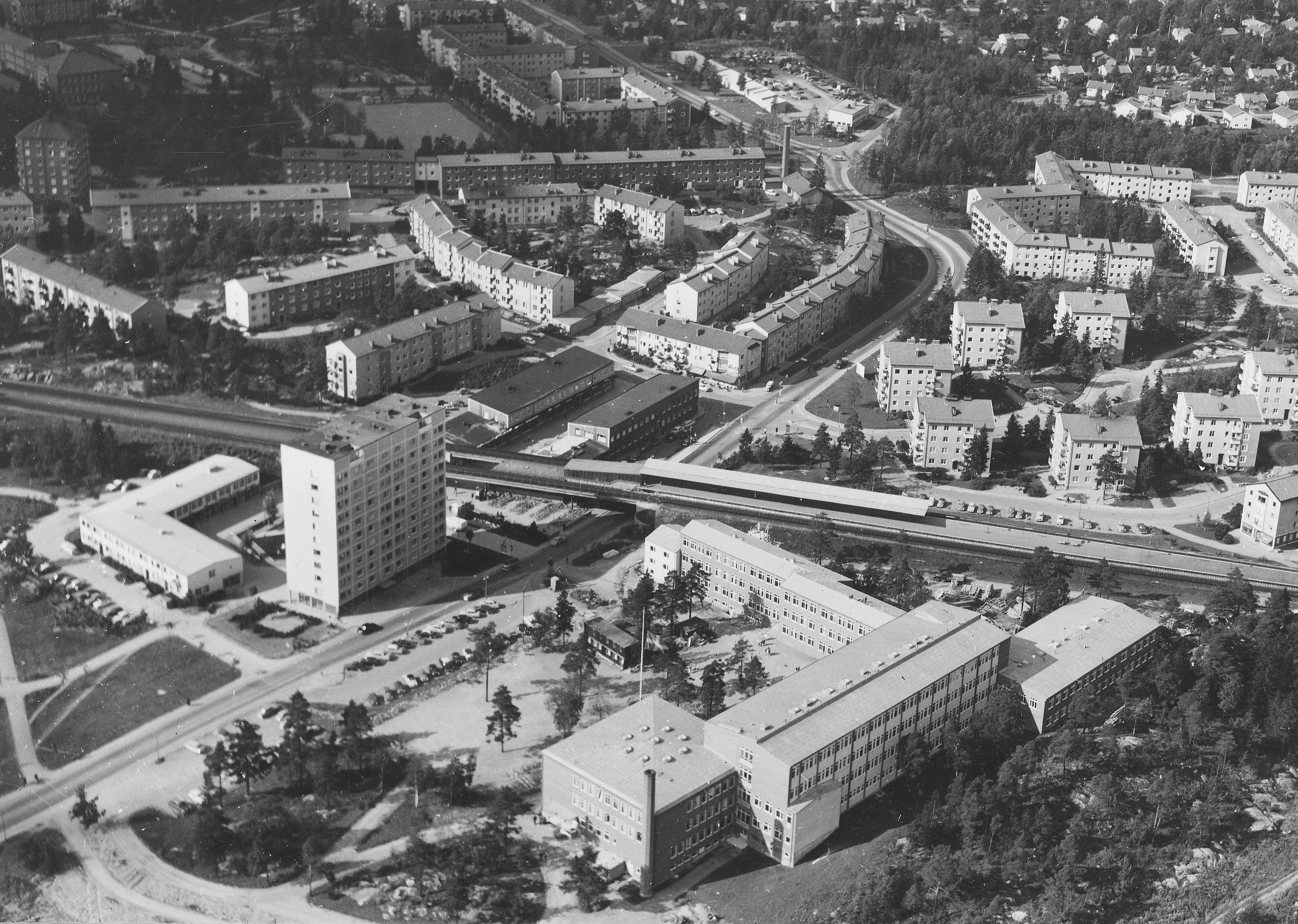 Bandhagens centrum och Bandhagens gymnasium. Höghuset markerar centrum i stadsbilden. Arkitekt var Fred Forbat for HSB 1954-1955. Bandhagens gymnasium uppfördes 1957–1959 och aulan 1967–1969 efter ritningar av arkitekt Lennart Brundin.